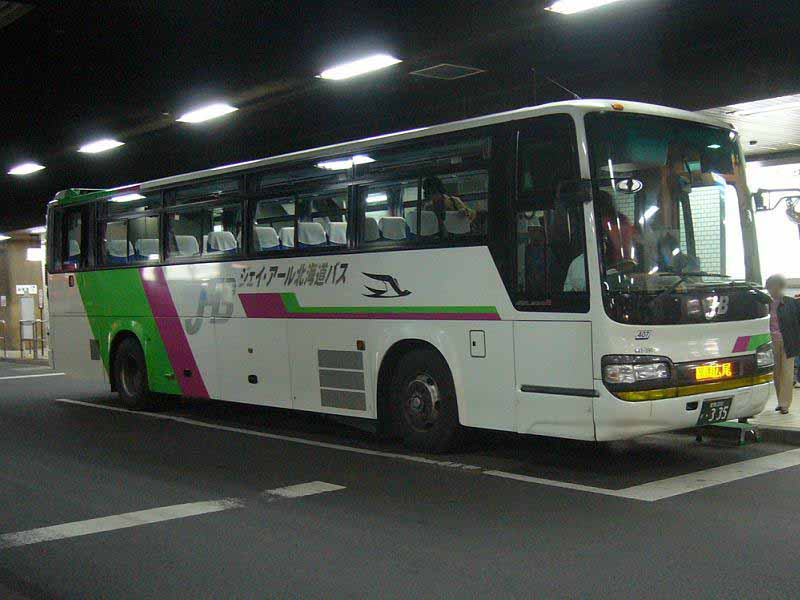 登録番号 室蘭200か・335 ジェイアール北海道バス(JR Hokkaido bus)所属 高速ひろおサンタ(Higway bus Hiro-o Santa)号用 日野・セレガ KL-RU4FSEA